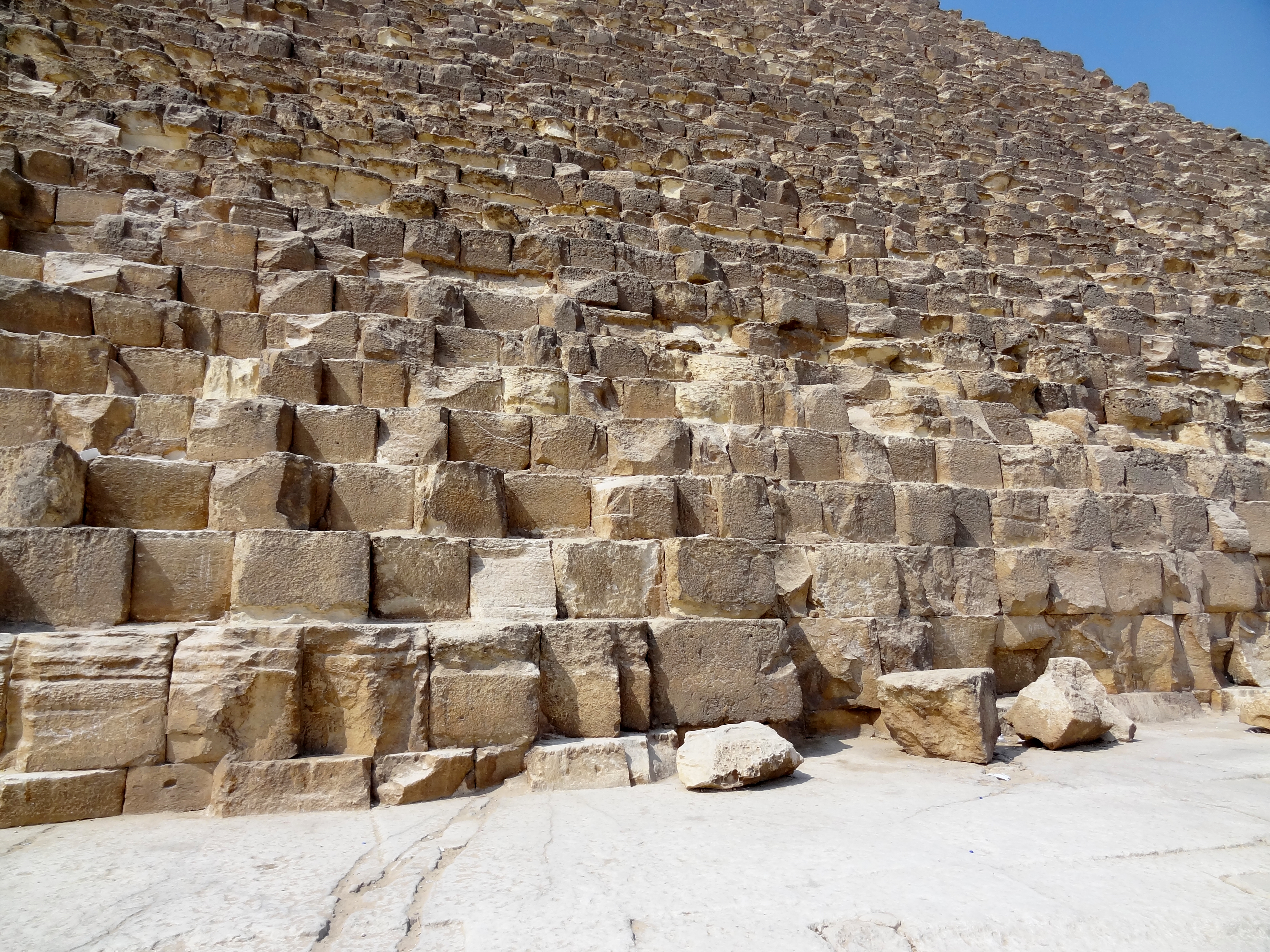 Ostseite der Cheops-Pyramide in Giseh, Ägypten